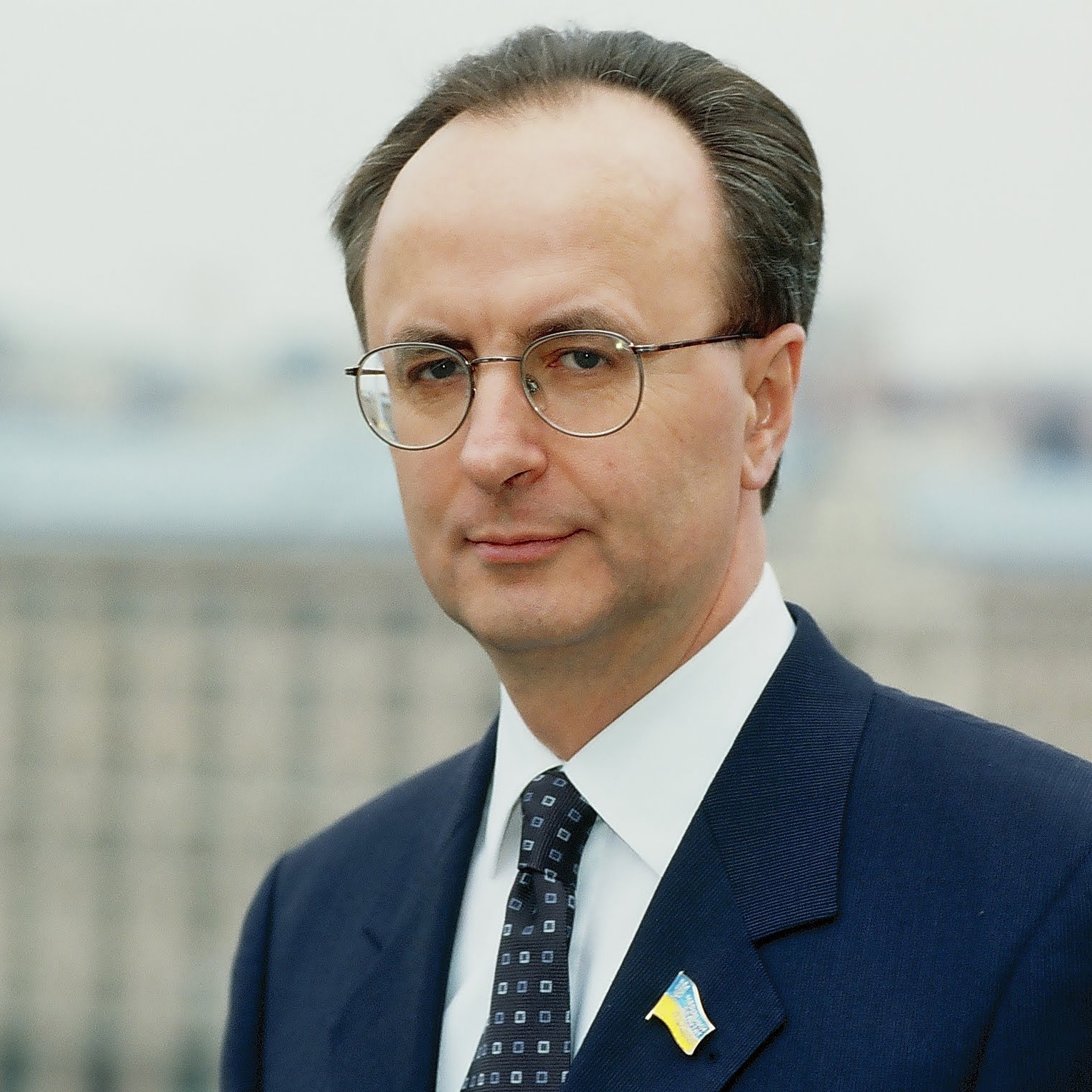 Фотопортрет народного депутата Украины Леонида Косаковского